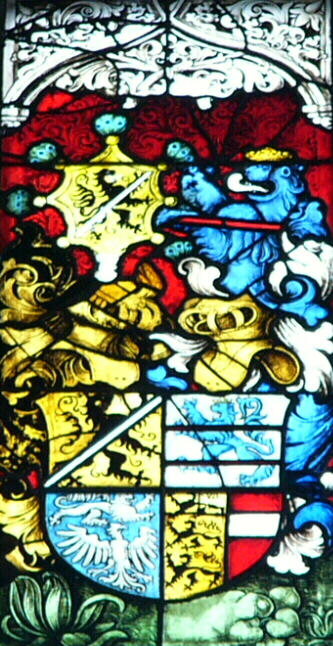 Fenster des Bischofs von Bamberg: Darstellung von Veit I. Truchseß von Pommersfelden